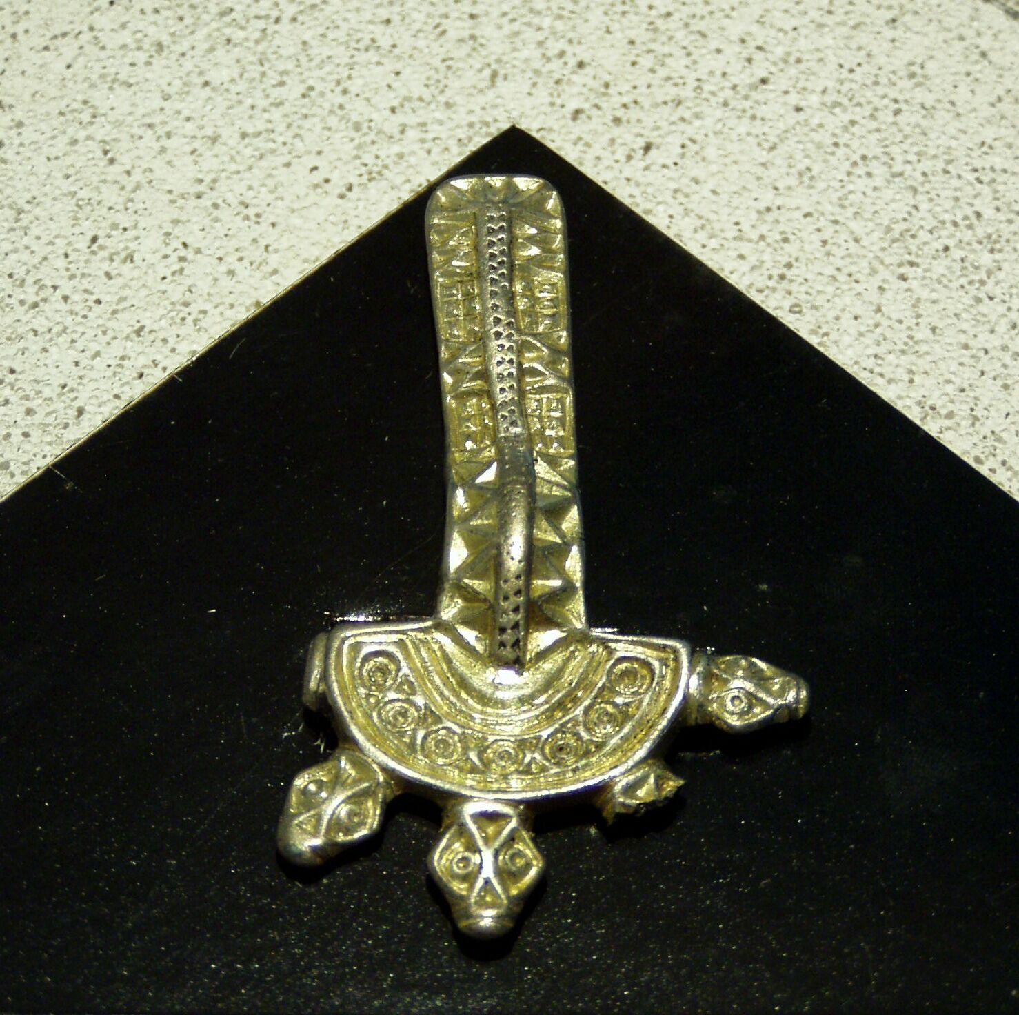 Hemmaberg, Carinthia. Alamannische Bügelfibel, Silber vergoldet, 490 bis 520 n.Chr. gefunden unter dem Estrich der westlichen Doppelkirche.